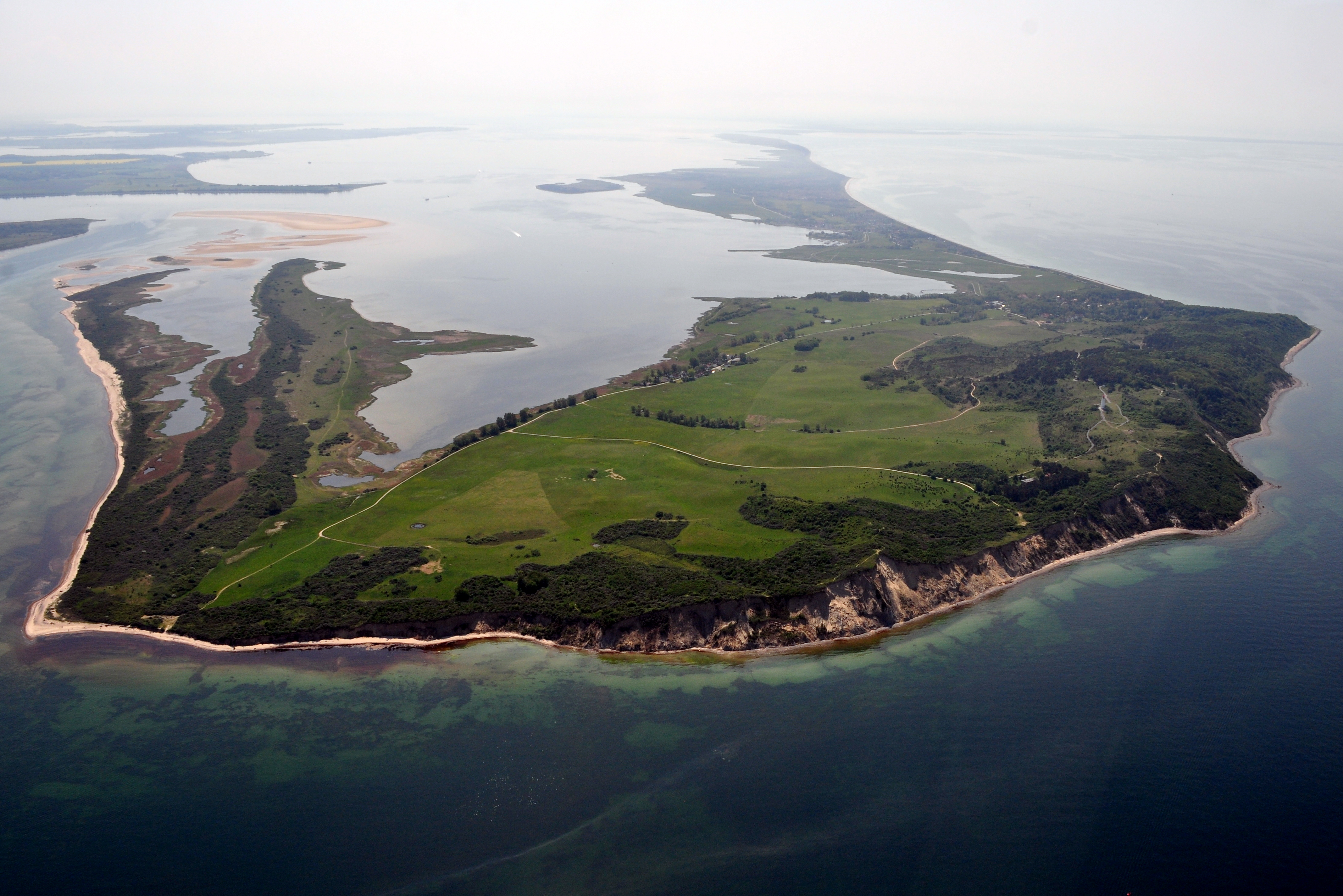 Die Bilder wurden von mir während eines einstündigen Rundflugs ab Flugplatz Güttin am 21. Mai 2011 aufgenommen. Die Bildbeschreibung steht im Dateinamen. Aufgenommen mit einer Nikon D5000 durch das Seitenfenster des Flugzeugs.